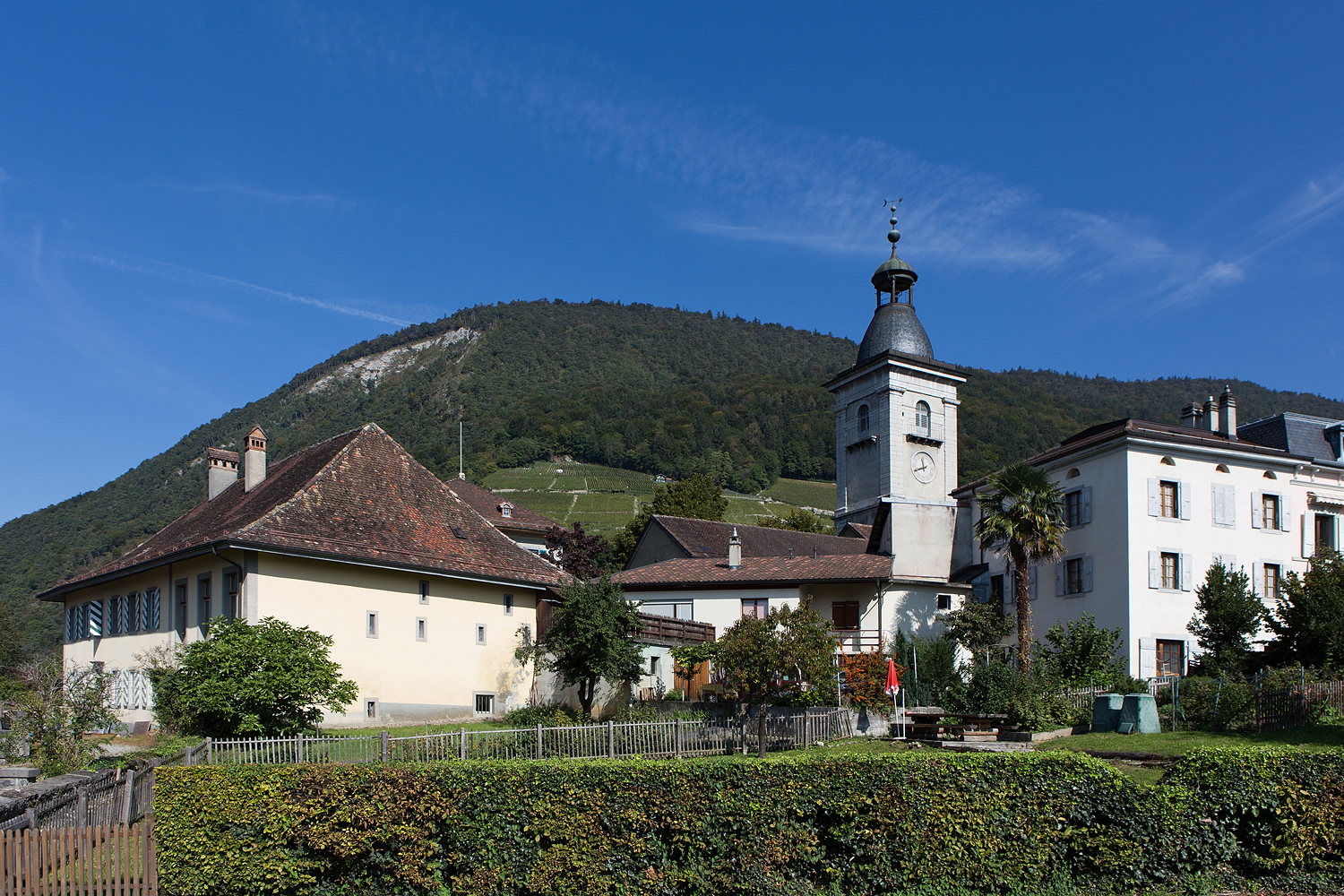 Pfarrhaus und Kirche Saint Victor mitten in Ollon